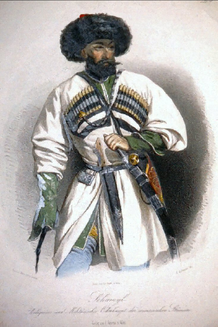 Imam Schamil, Lithographie von Rudolf Hoffmann nach einer Zeichnung von Laurens